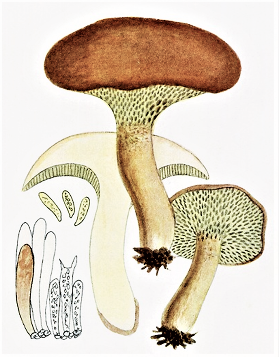 Giacomo Bresadola: Boletus bovinus (L.) (1753), heute Suillus bovinus (L.) Roussel (1806)